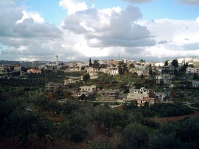 منظر عام لبلدة عبا